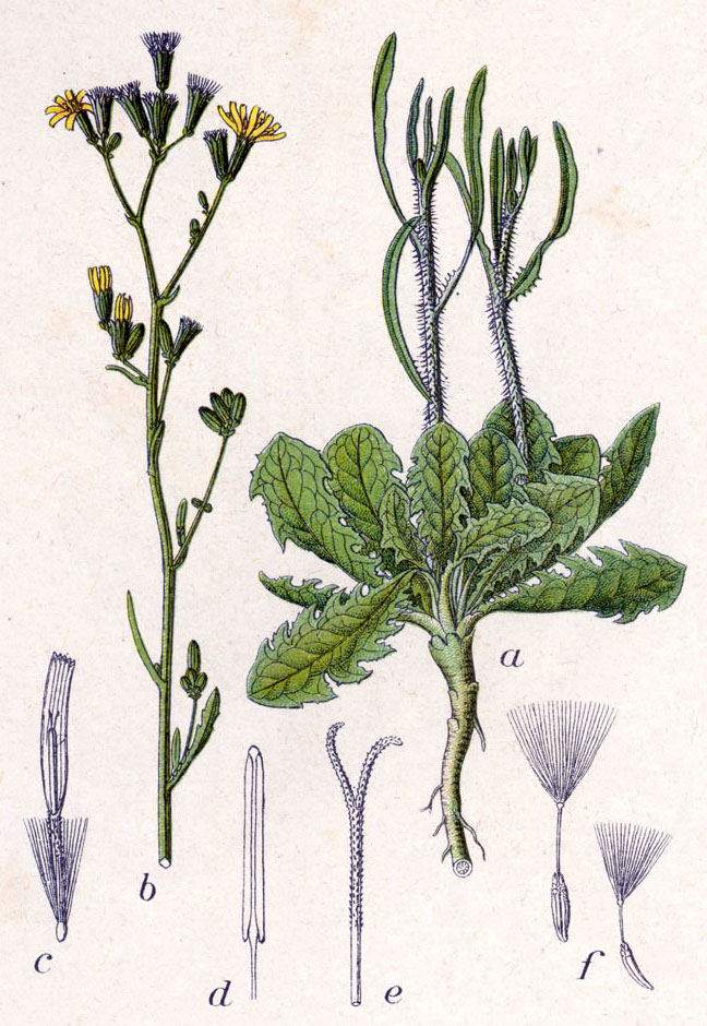 Chondrilla juncea L. Original Caption Gemeine Chondrille, Chondrilla juncea